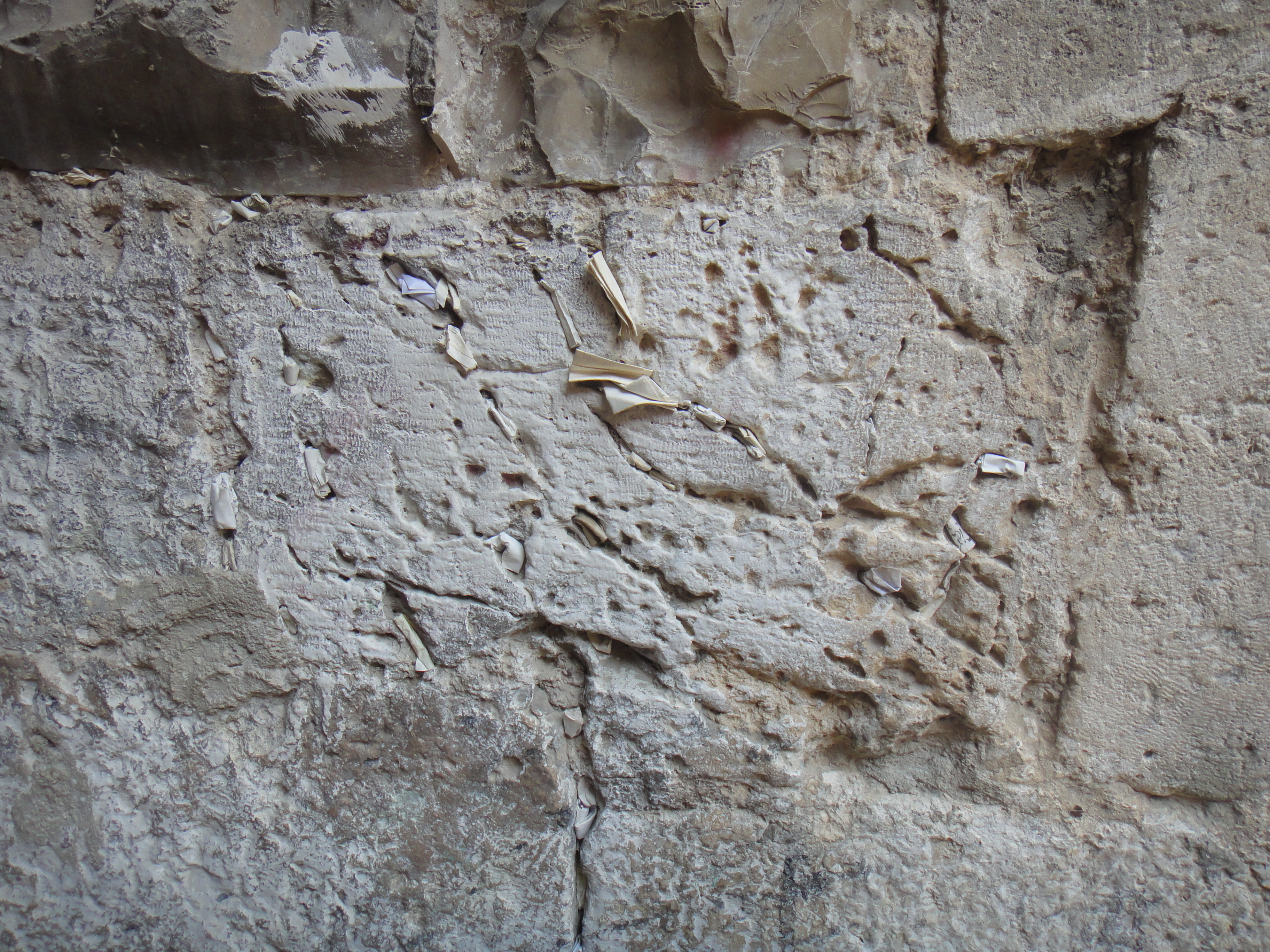 הכותל הקטן